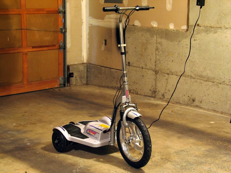 Tricyclopod